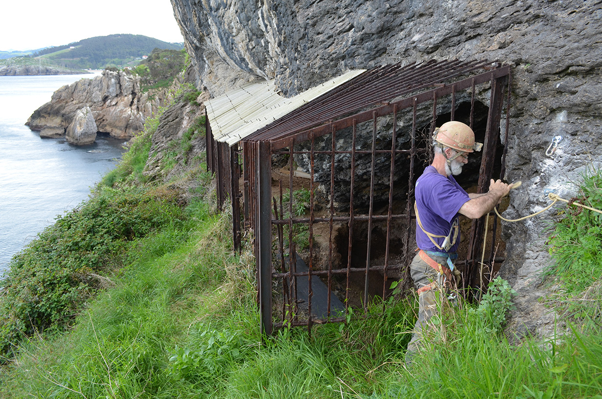 Antzoriz I edo Santa Katalina kobazuloa, Paleolitoan ez bezala, gaur egunean itsaso gainean dago.